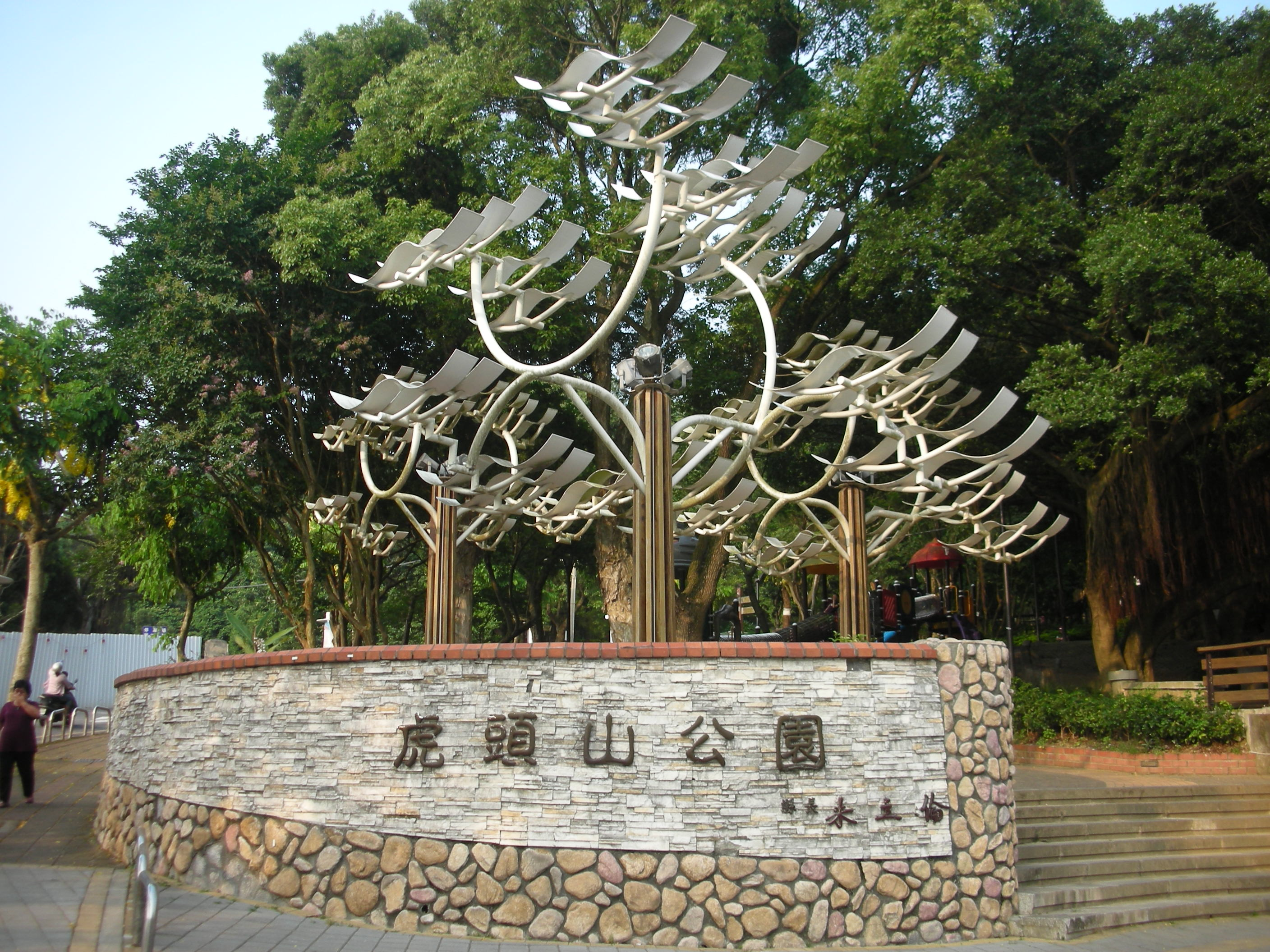 桃園市 虎頭山公園